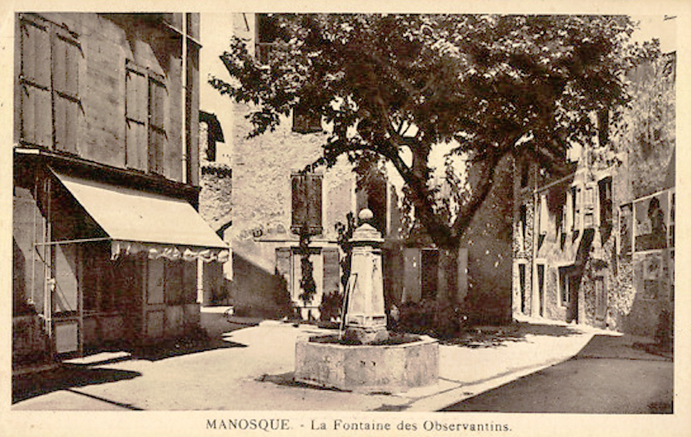 Fontaine-des-Observantins à Manosque